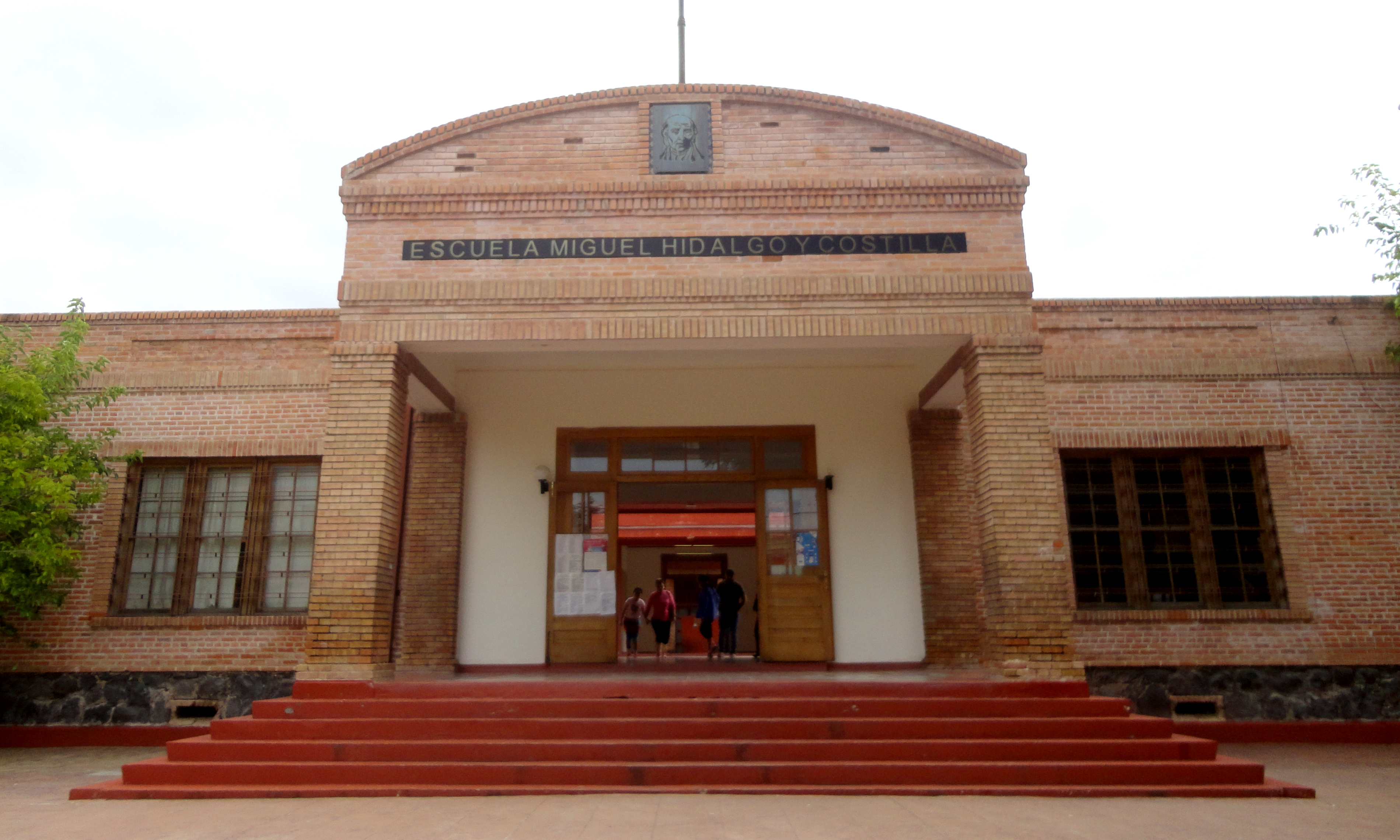 Escuela Primaria Miguel Hidalgo y Costilla "Centenario", Dolores Hidalgo, Guanajuato, México.